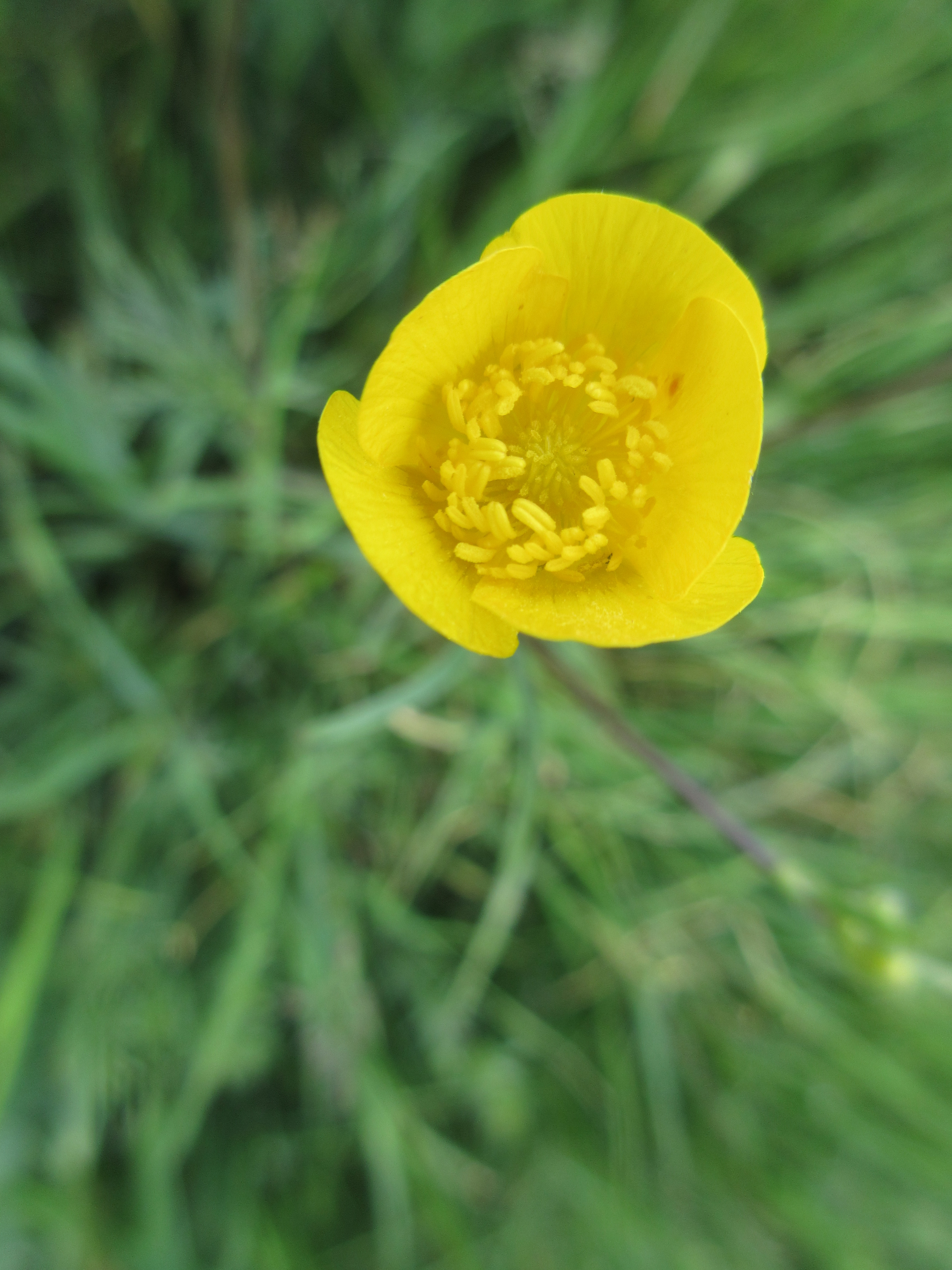 Ranunculus acris, Ústí nad Orlicí, Czech Republic